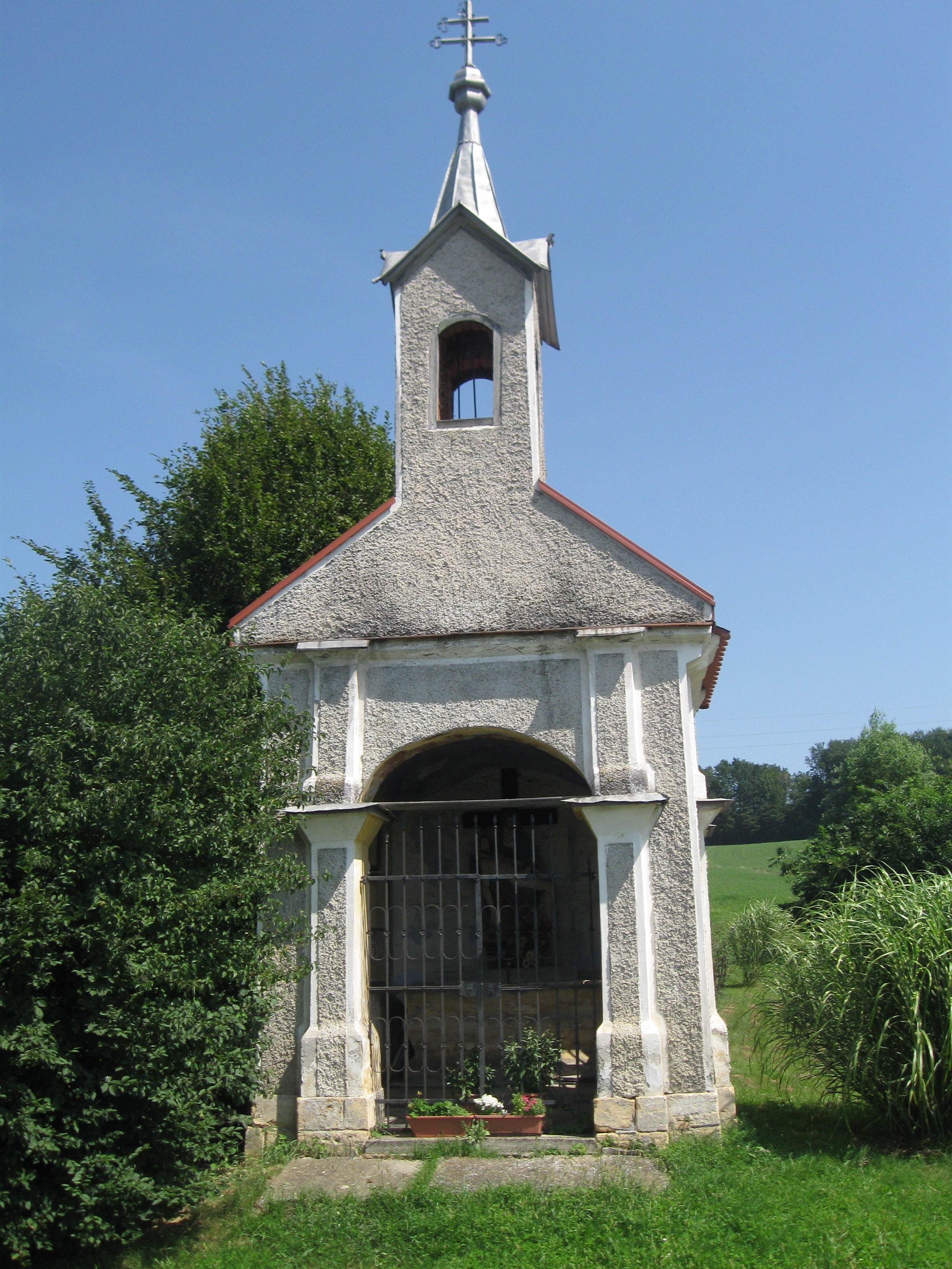 Kapela z zvonikom je bila postavljena leta 1870. Pokriva jo dvokapnica. Kapela stoji ob hiši Zgornje Verjane 18.